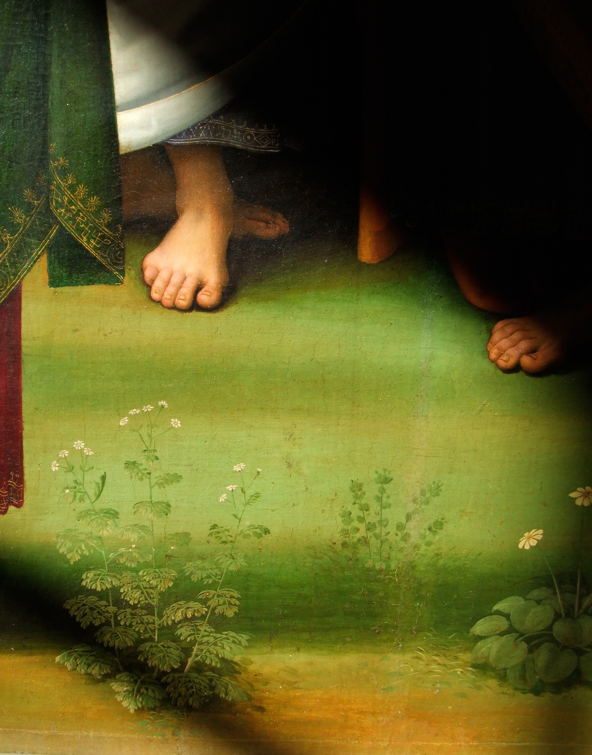 Détails du bas du polyptyque de saint Pierre du Pérugin